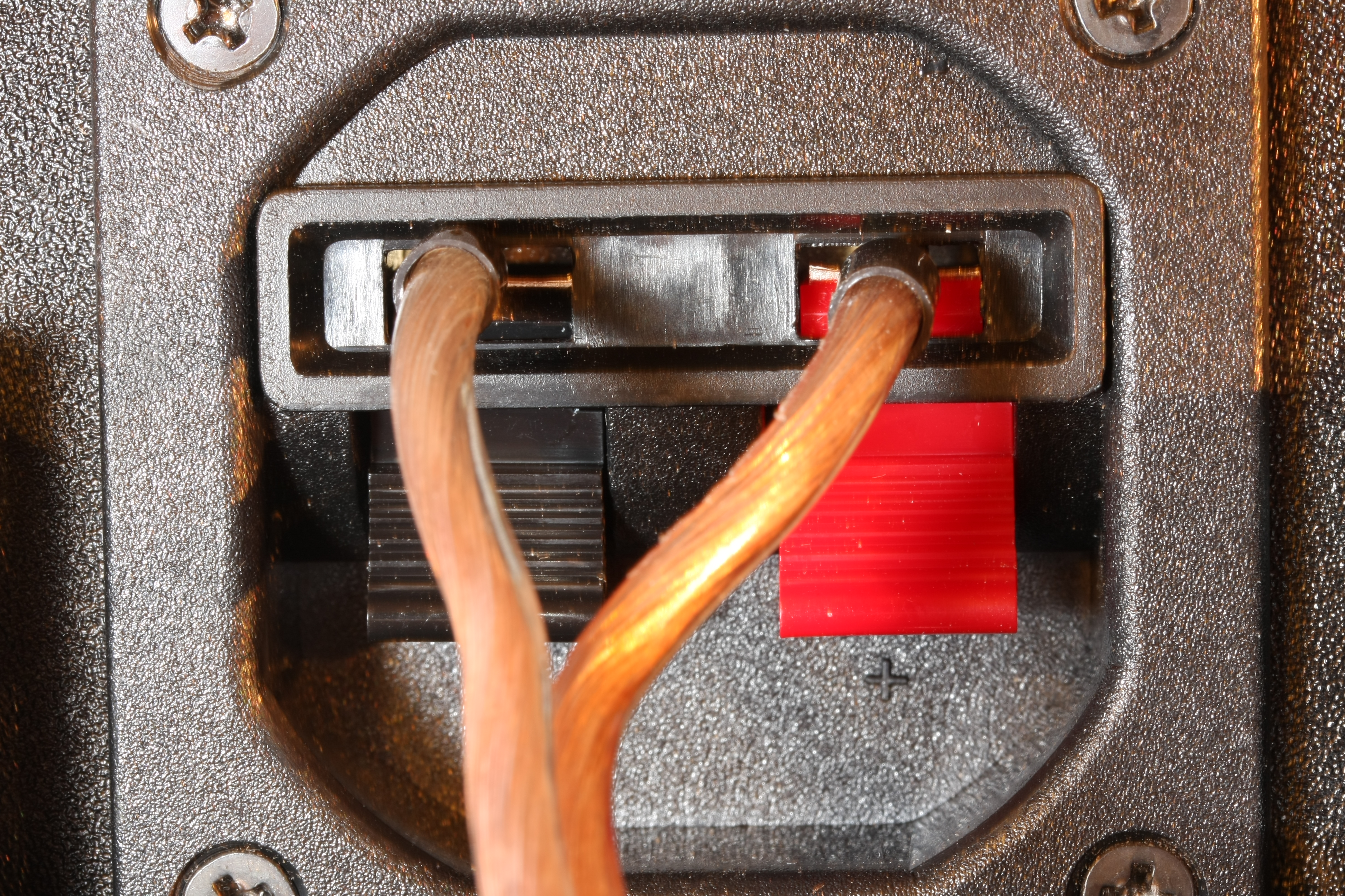 Lautsprecherkabel im Anschlussterminal (Visaton), geklemmt mit Aderendhülsen, Makroaufnahme